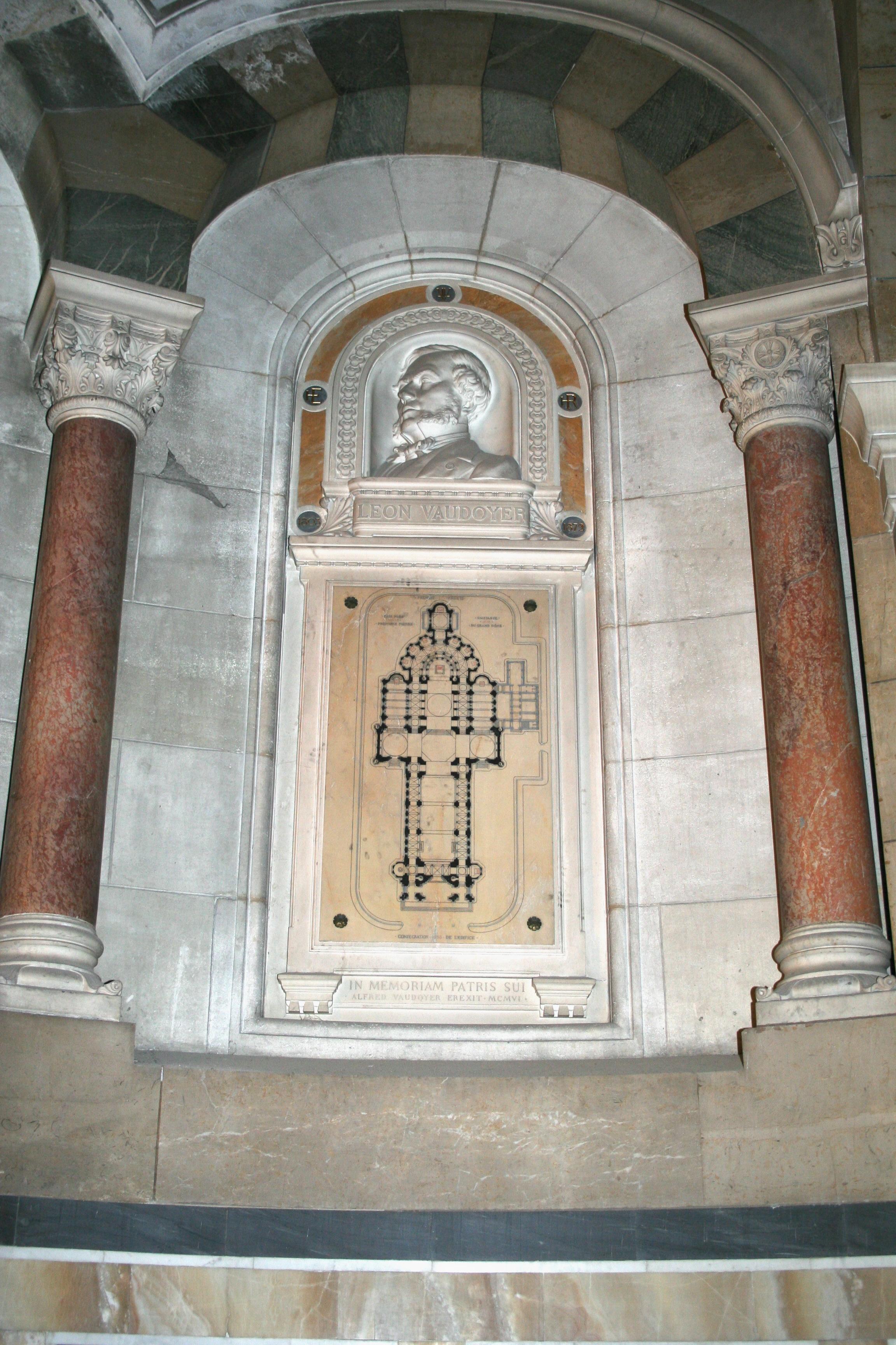 Plaque commémorative de l'architecte Vaudoyer se trouvant dans la Cathédrale de La Major à Marseille.